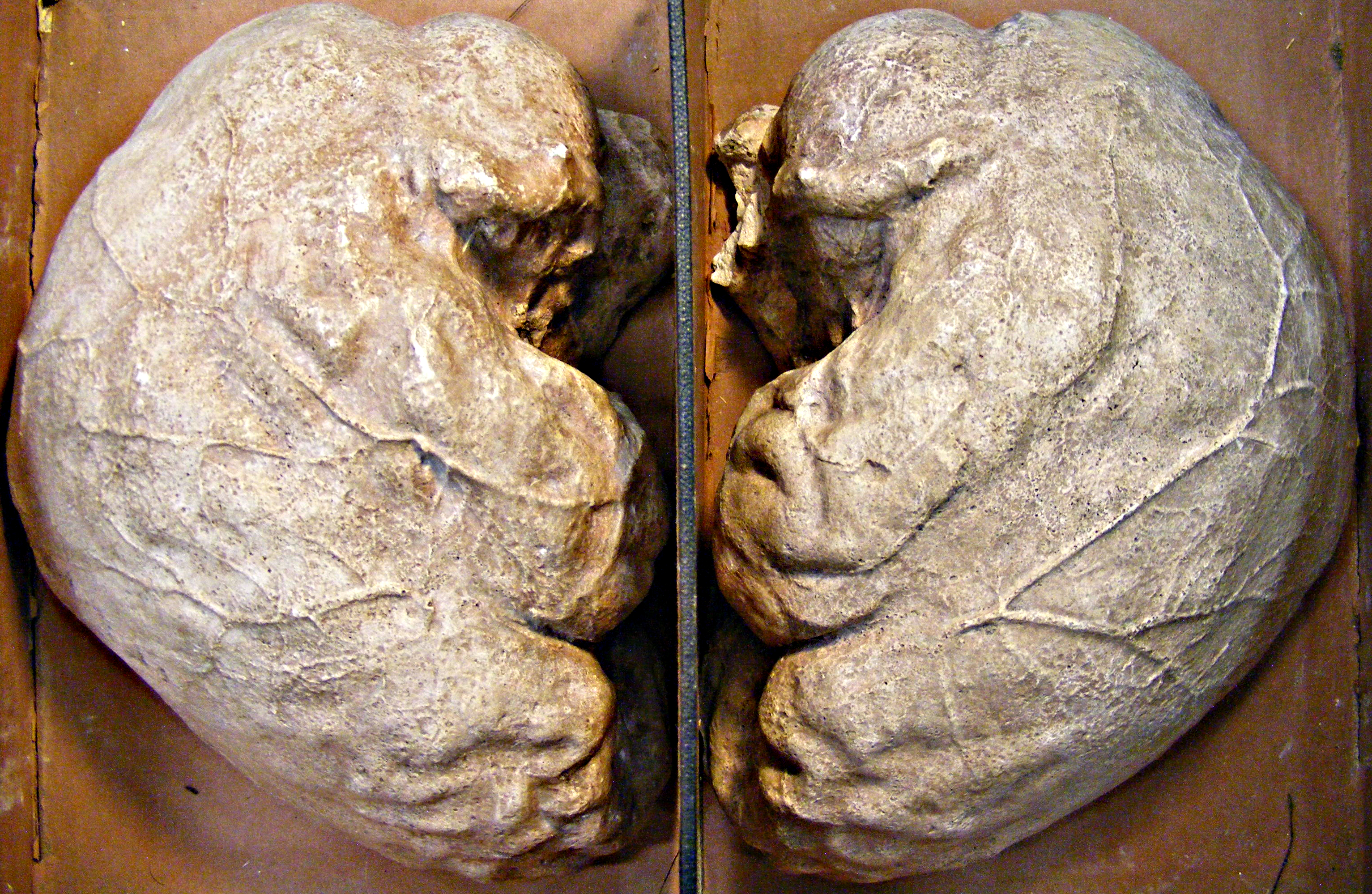 Bachhaus Eisenach, mutmaßliche Gebeine von Johann Sebastian Bach, Gehirnschalenausguss von Wilhelm His und Carl Seffner, 1894